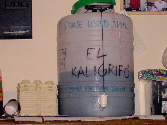 El calimocho se suele elaborar de forma casera y en grandes cantidades. Sírvase usted mismo El Kaligrifo Fórmula cualitativa vino barato, Coca-Cola, e hielo